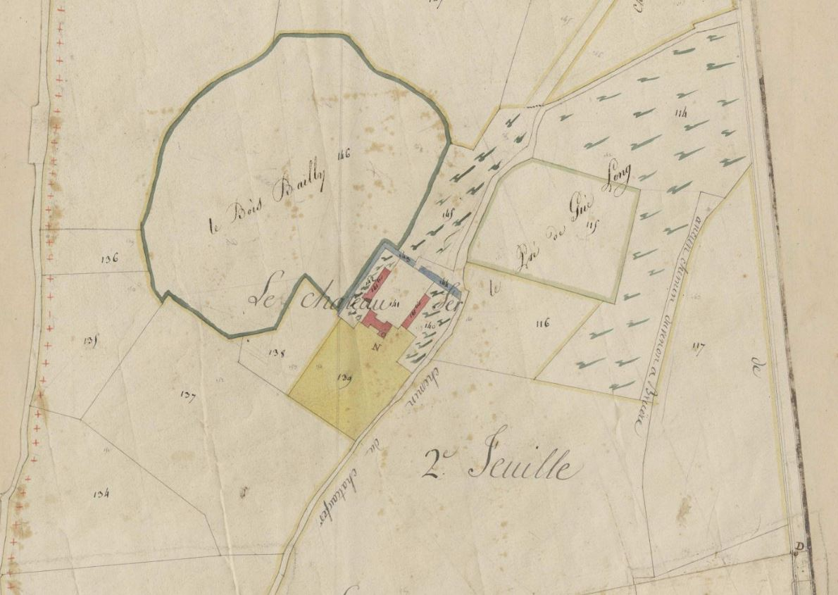 Plan du cadastre napoléonien du château de Chateaufer (1813)